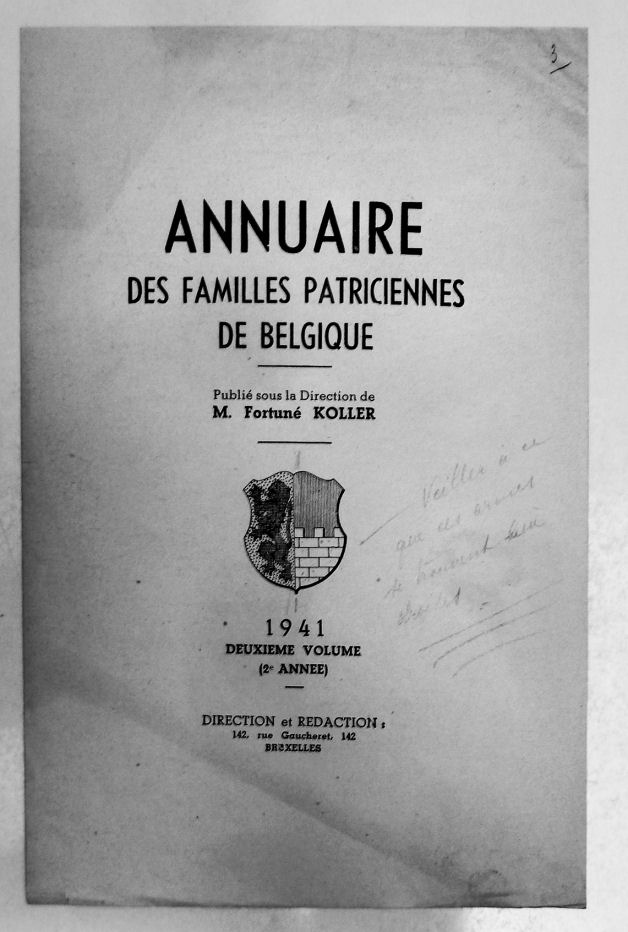 Hanschrift Koller, Stedelijk archief Sint-Niklaas, SVG